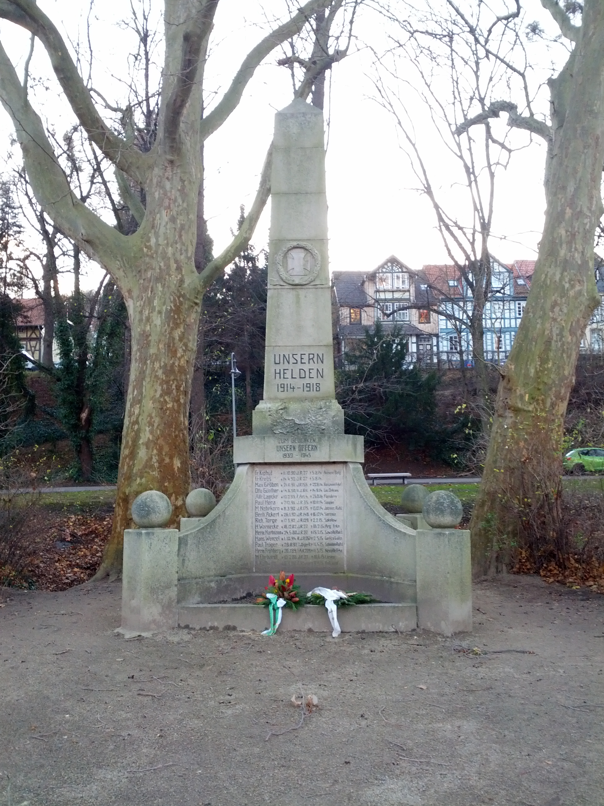 Denkmalgeschütztes Kriegerdenkmal in Wernigerode an der Promenade am Ufer des Zillierbachs